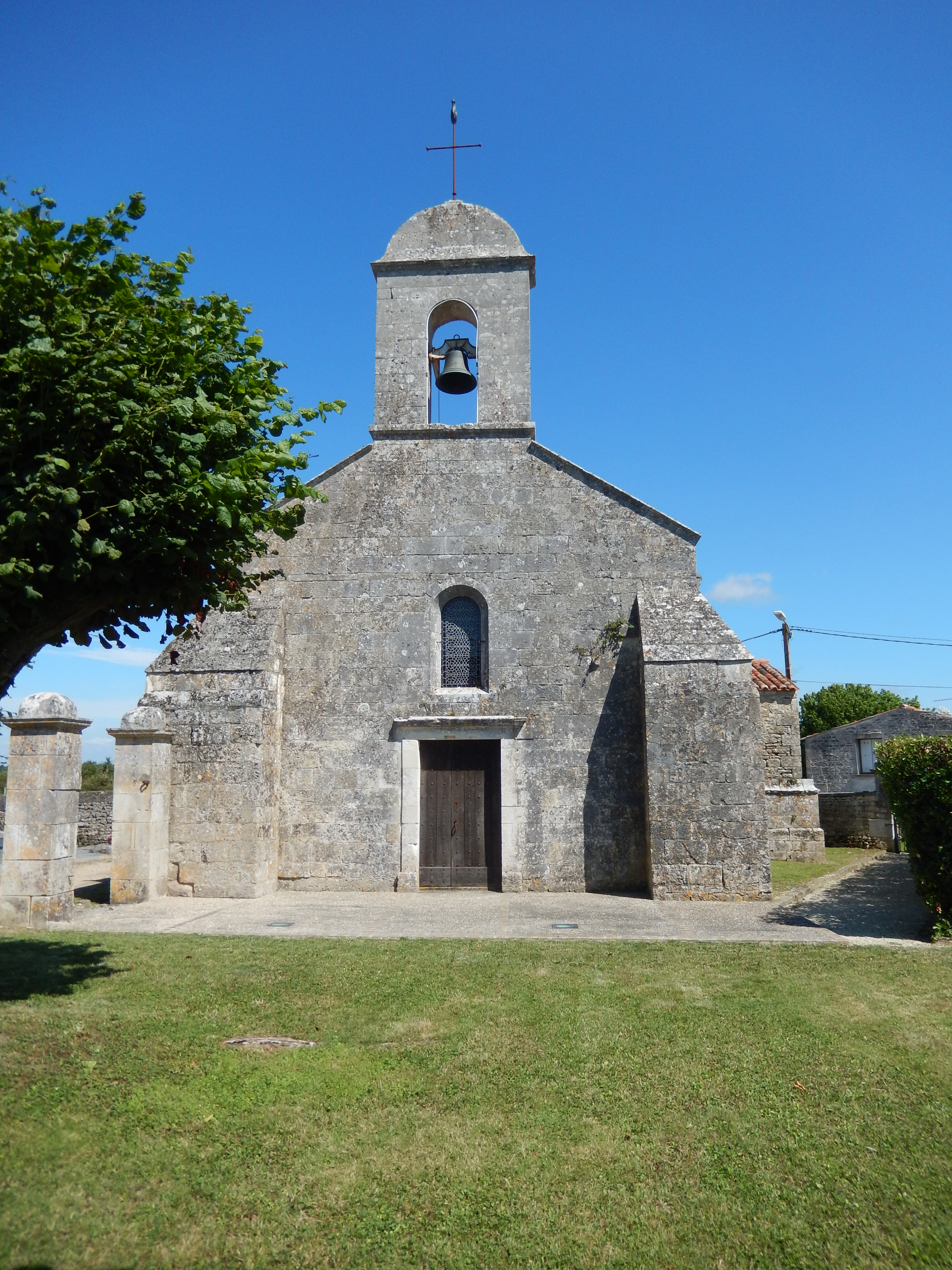 Beaugeay, Charente-Maritime, France. • L'église Saint Germain de Beaugeay, construite au onzième siècle.